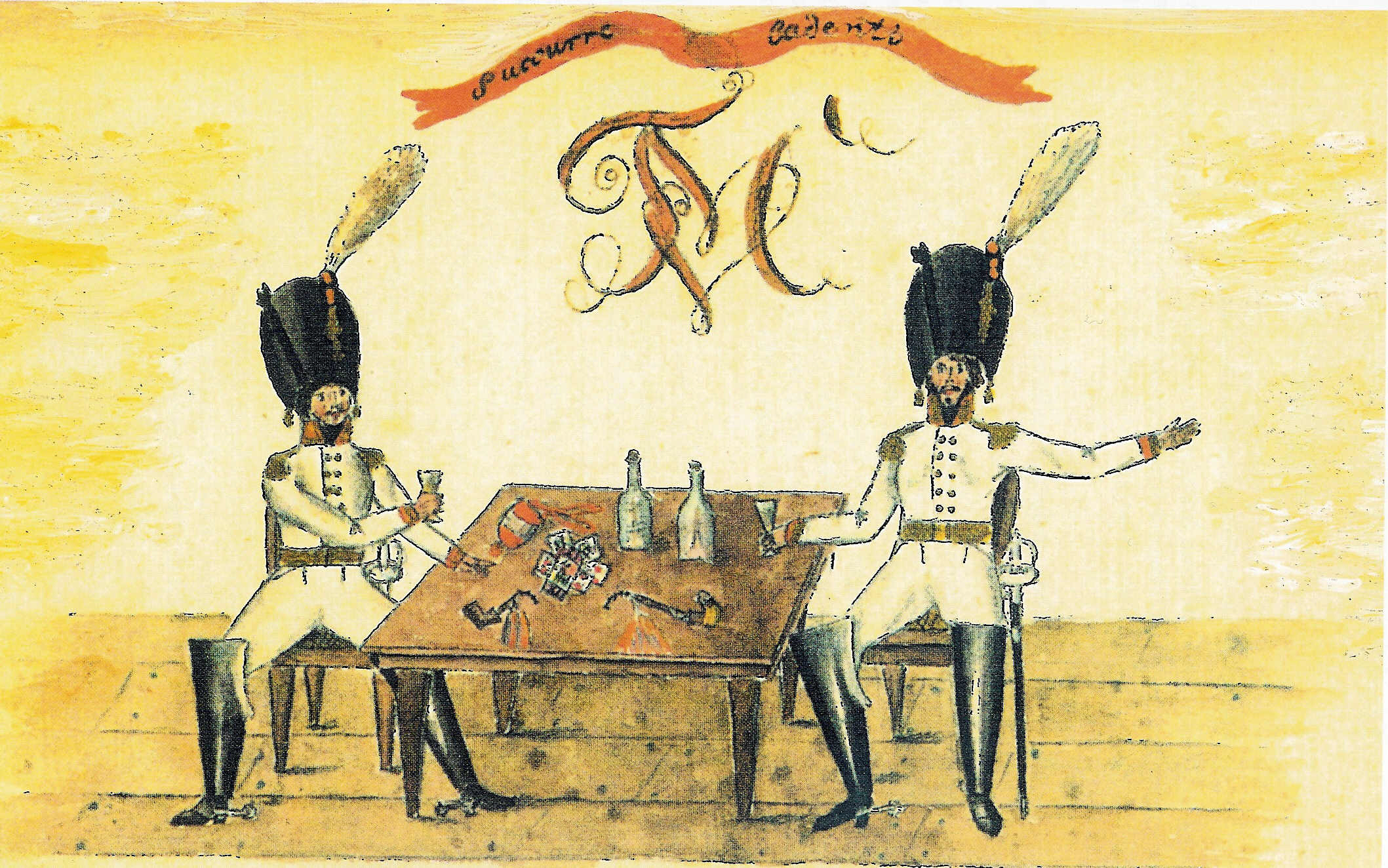 Märkische Studenten aus Frankfurt an der Oder bzw. aus Berlin aus der Frühzeit des Corps Marchia Berlin, 1811, Stammbuchblatt von August Hermann Klaatsch. Das Blatt zeigt den Übergang vom "Märkischen Kränzchen" in Frankfurt an der Oder hin zum Corps Marchia in Berlin zeigt. Das Blatt wurde von August Hermann Klaatsch, der in Frankfurt an der Oder, in Halle und in Berlin Mitglied einer Marchia war, einem Märker namens Herrmann gewidmet, die Zeichnung ist vermutlich auch von Klaatsch. Man beachte die dominierenden Farben orange und gold und den interessanten Zirkel. Die studentische Tracht der Märker, der "Wichs", wurde nachweislich von Klaatsch von Frankfurt an der Oder nach Berlin geschafft, so dass die Fortführung der Frankfurter Tradition in Berlin belegt ist. Die Frankfurter Marchia existierte von 1786 bis 1811, das offizielle Stiftungsdatum des Corps Marchia Berlin ist der 26. November 1810, also im Gründungsjahr der Berliner Universität.